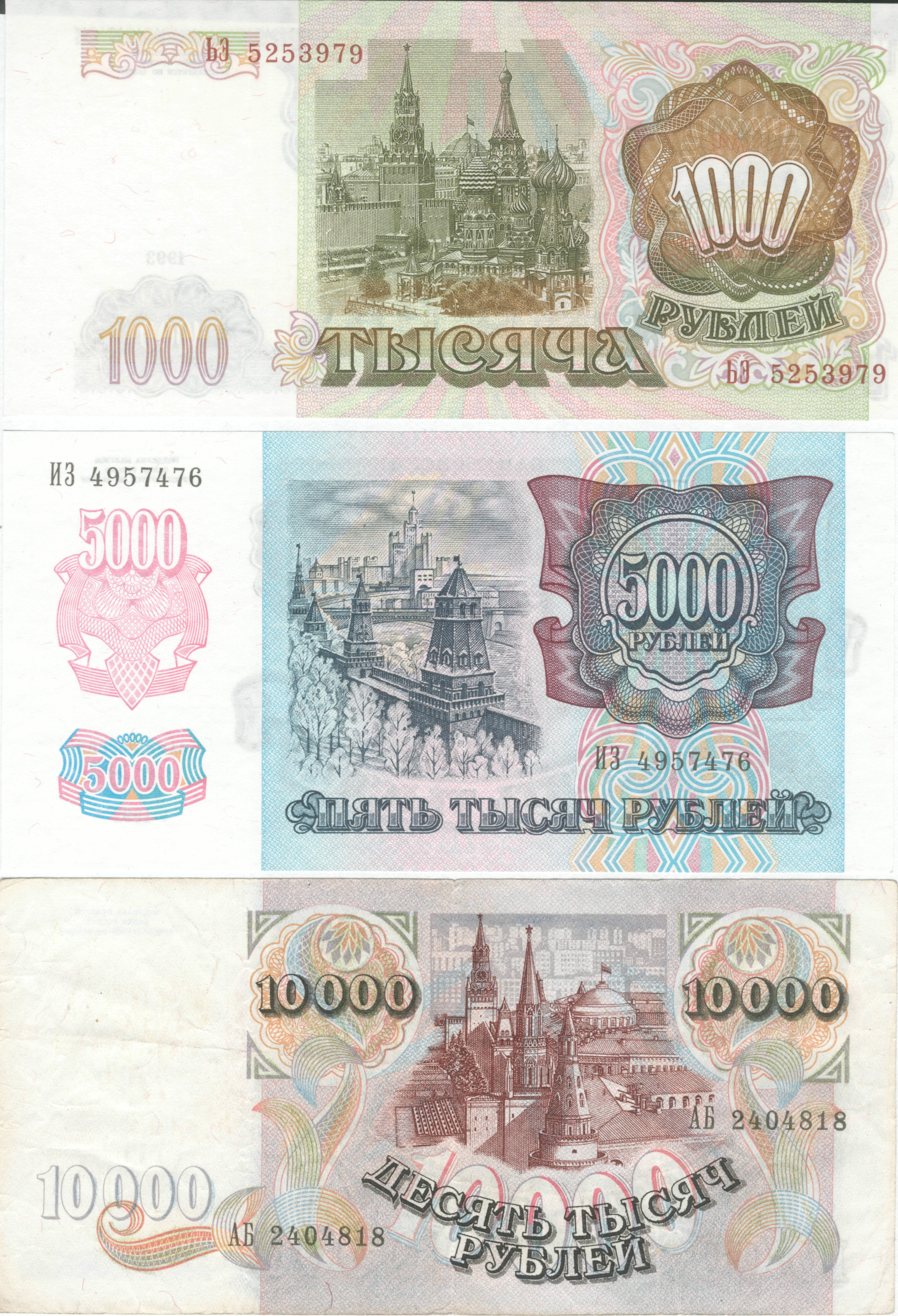 1000, 5000, 10000 российских рублей. 1992-1993. Реверс